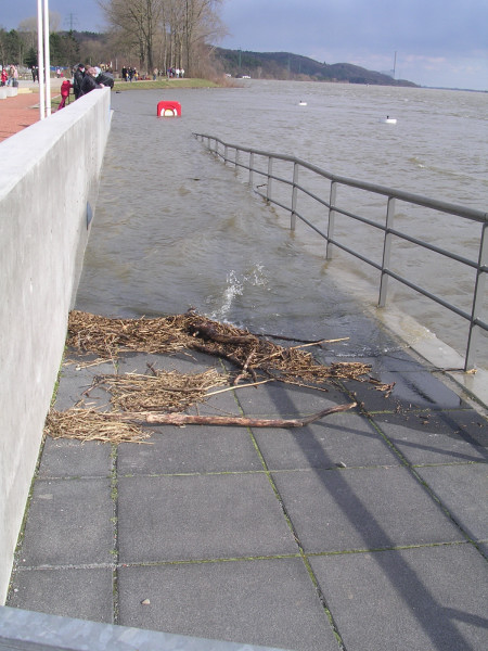 Elbanleger in Geesthacht / Roter Platz am 09.04.2006 einen Tag vor dem Wasserscheitel der Frühjahrsflut 2006 mit Blick auf das KKW Krümmel elbaufwärts.